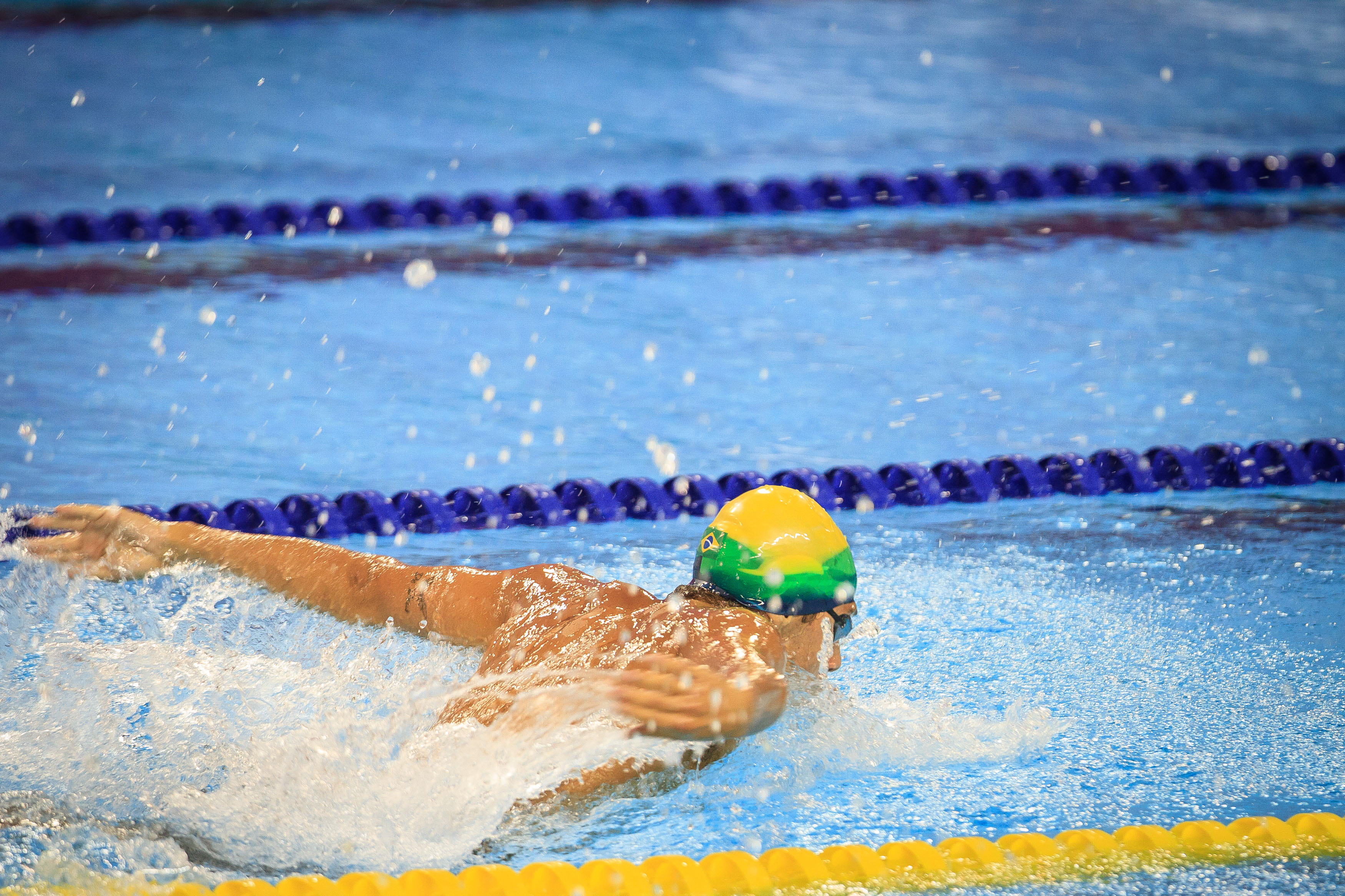 Bronze para Leonardo de Deus no nado borboleta em Gimcheon pelos 6º Jogos Mundiais Militares. Foto: Sgt Johnson Barros